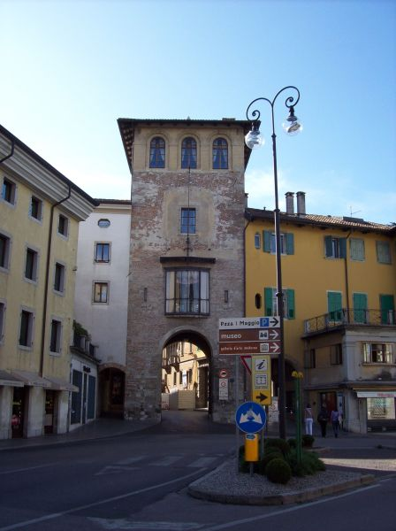 Udine (Friuli Venezia Giulia - Italy), Porta Manin